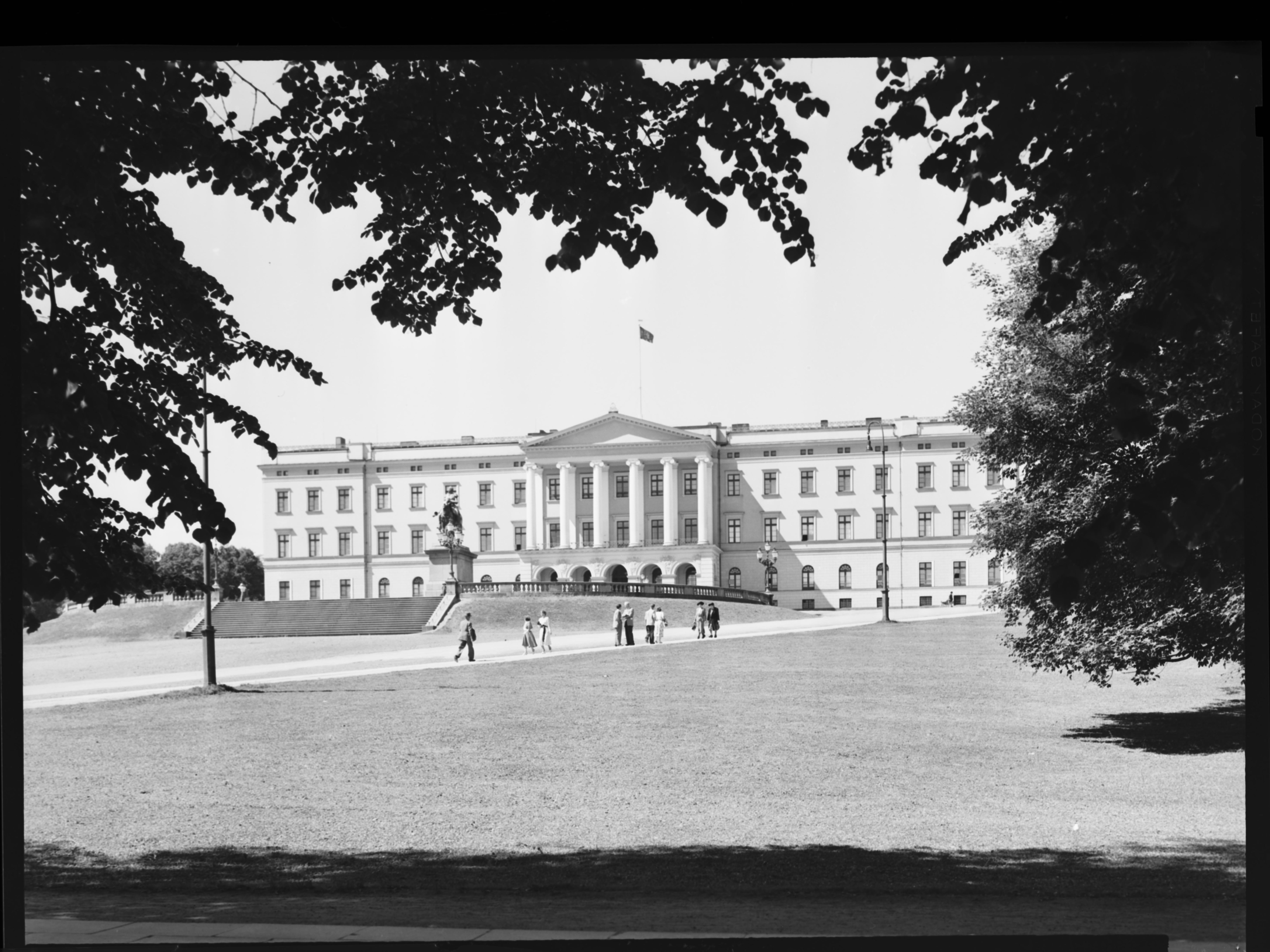 Bildet er hentet fra Nasjonalbibliotekets bildesamling. Anmerkninger til bildet var: Fotograf ukjent Oslo,Slottsplassen, Oslo, Oslo